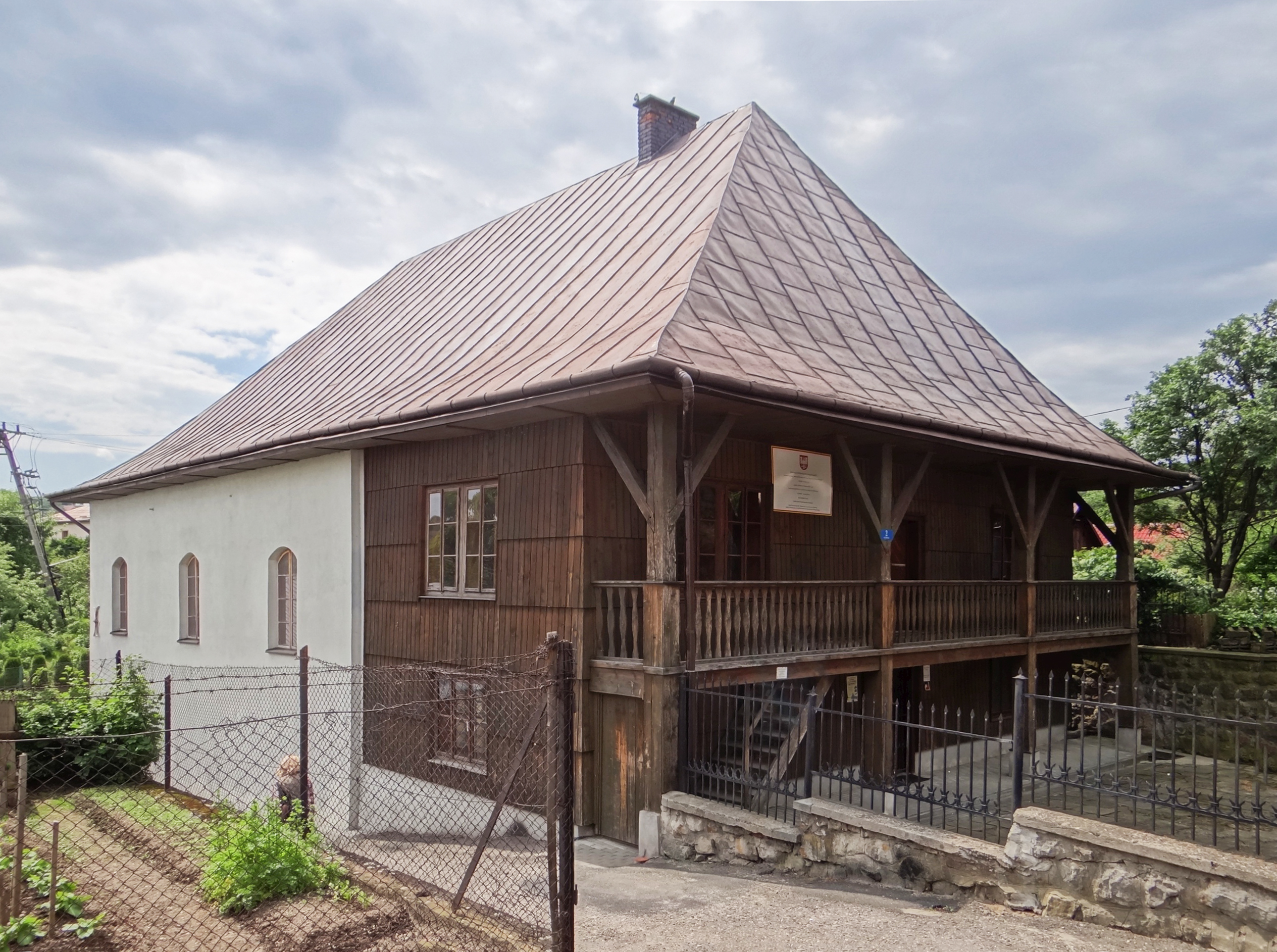 Synagoga w Bobowej